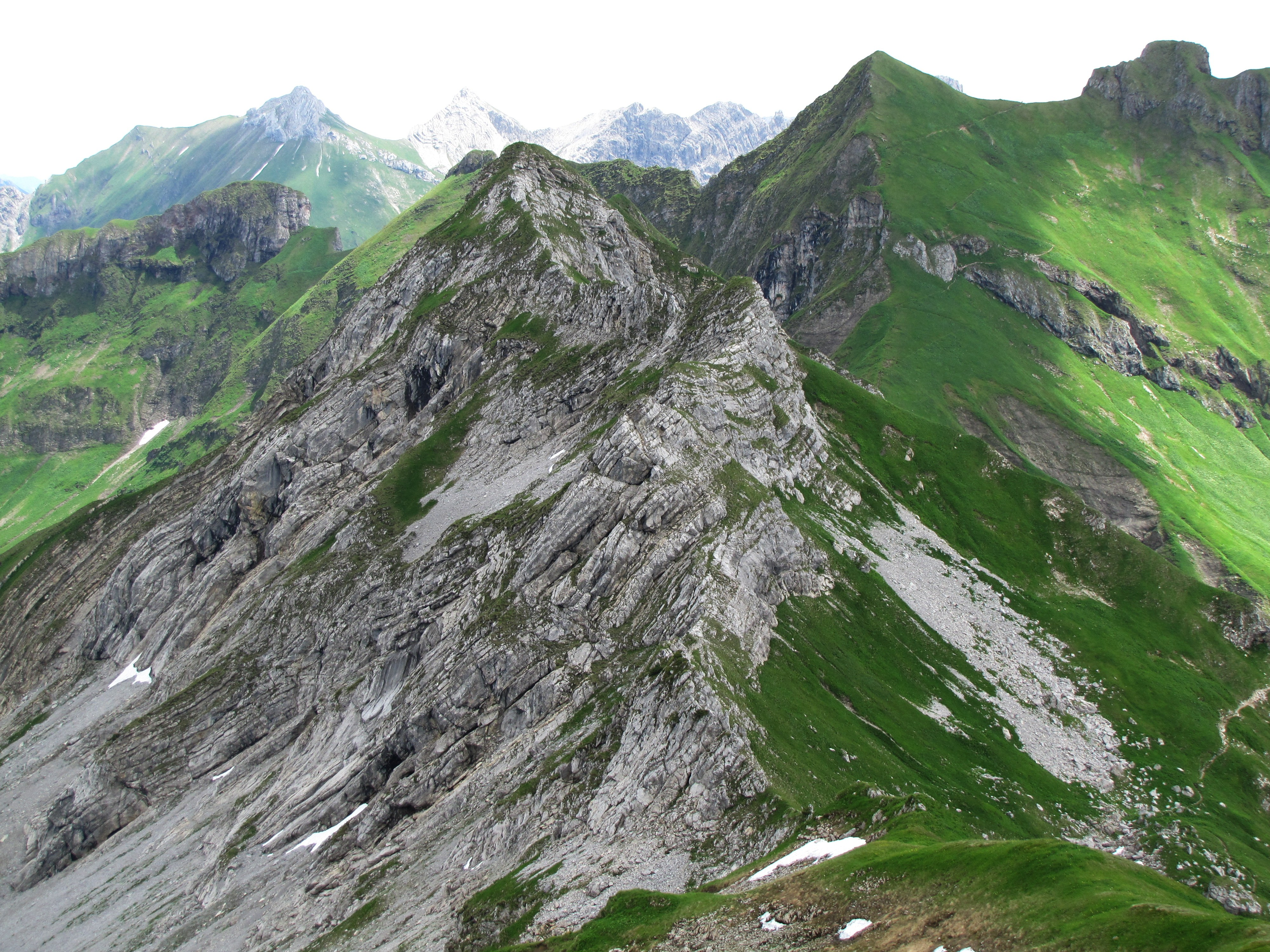 Blick vom Schochen (2100 m) nach Osten zum Lachenkopf (2111 m), dahinter das Laufbacher Eck (2178 m).